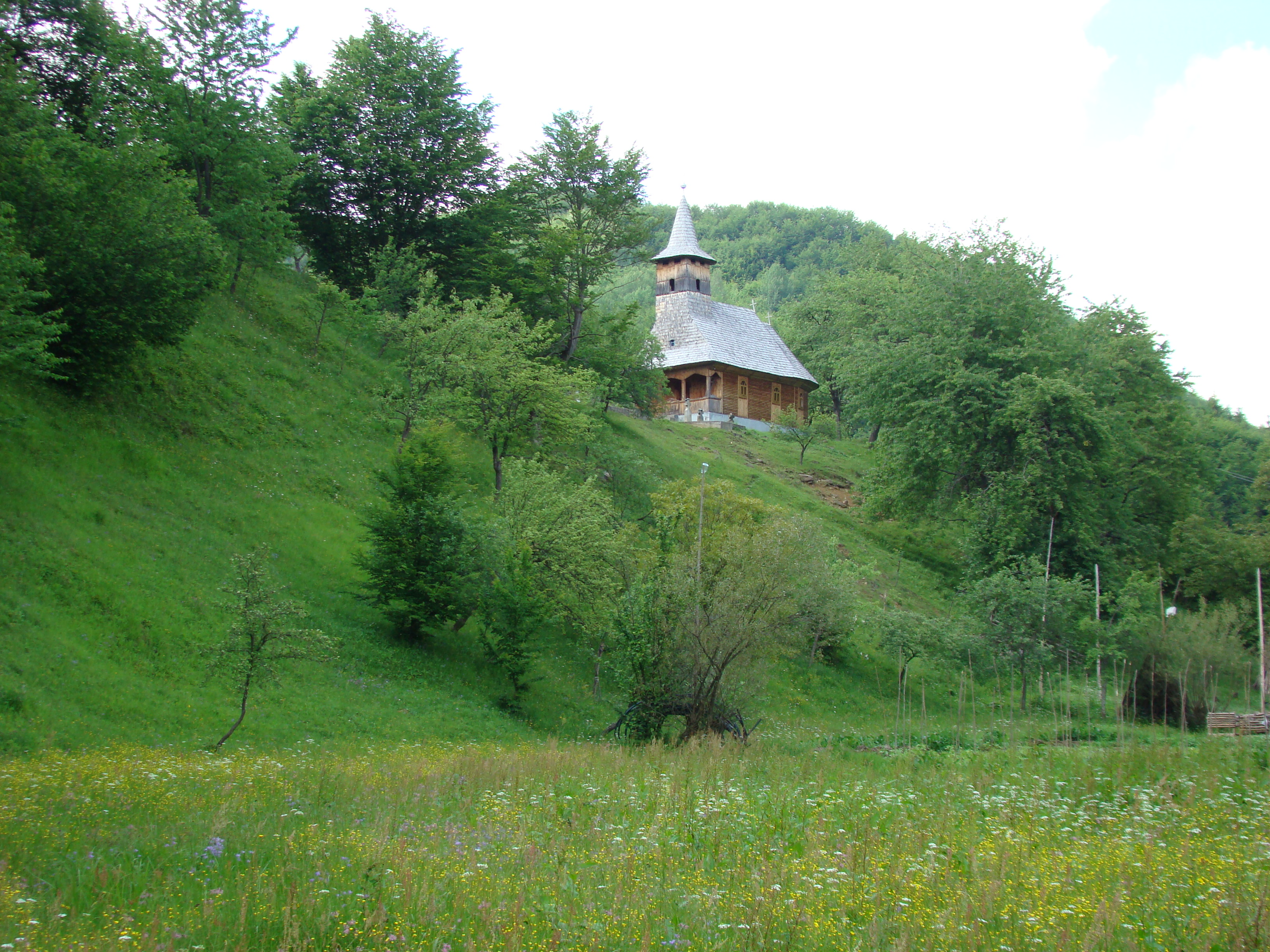 Biserica de lemn "Cuvioasa Paraschiva", sat IZVOARELE; comuna CERNEŞTI